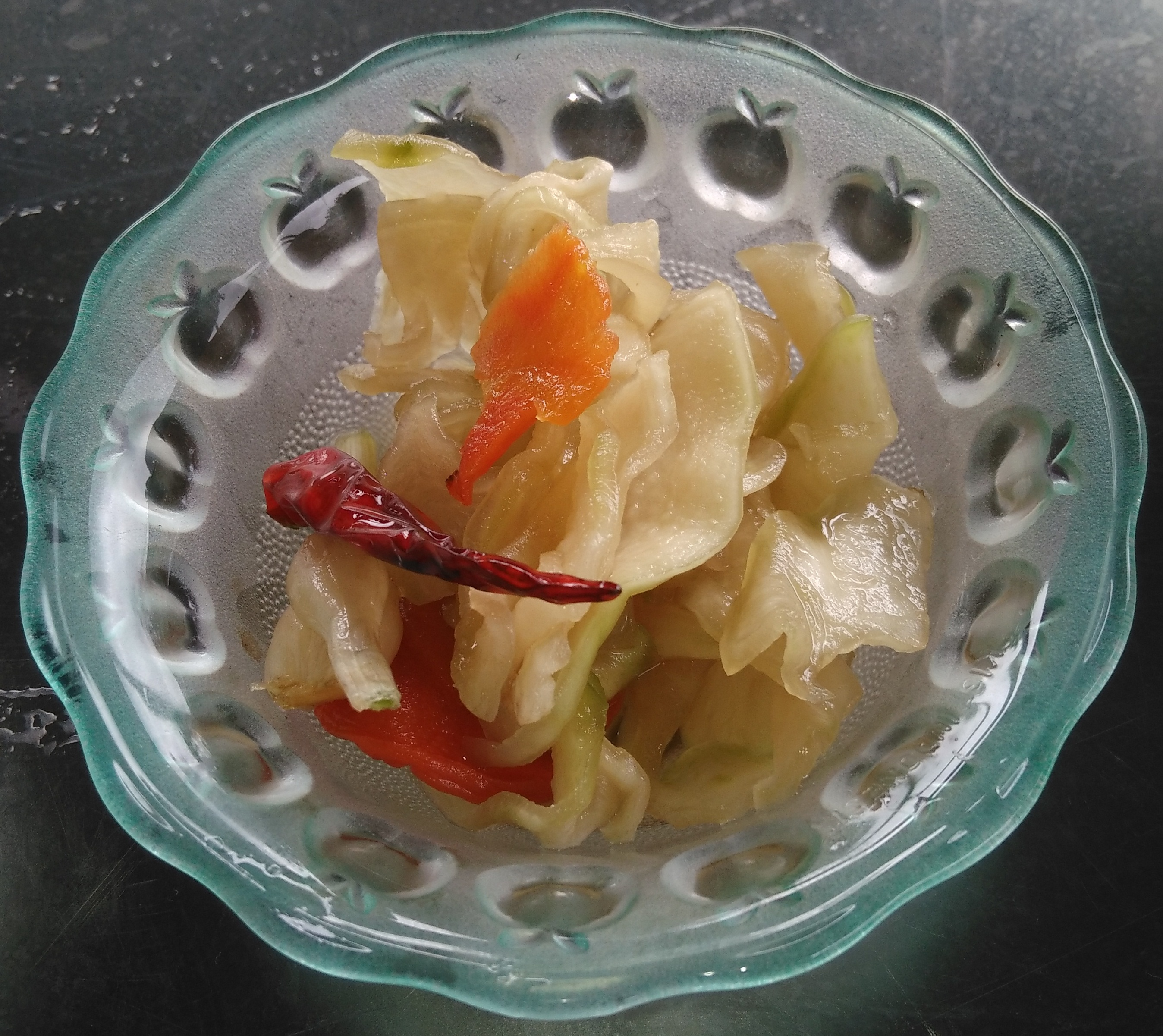 Dưa món Công Đoàn Quảng Trị, Tết 2018